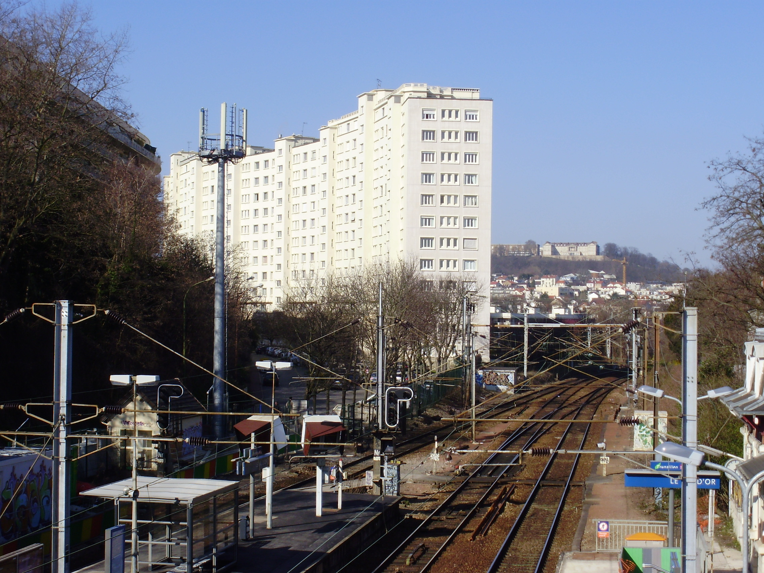 Gare du Val d'Or, à Saint-Cloud, Hauts-de-Seine, France (Vue en direction de la gare de Suresnes-Mont-Valérien depuis la passerelle)